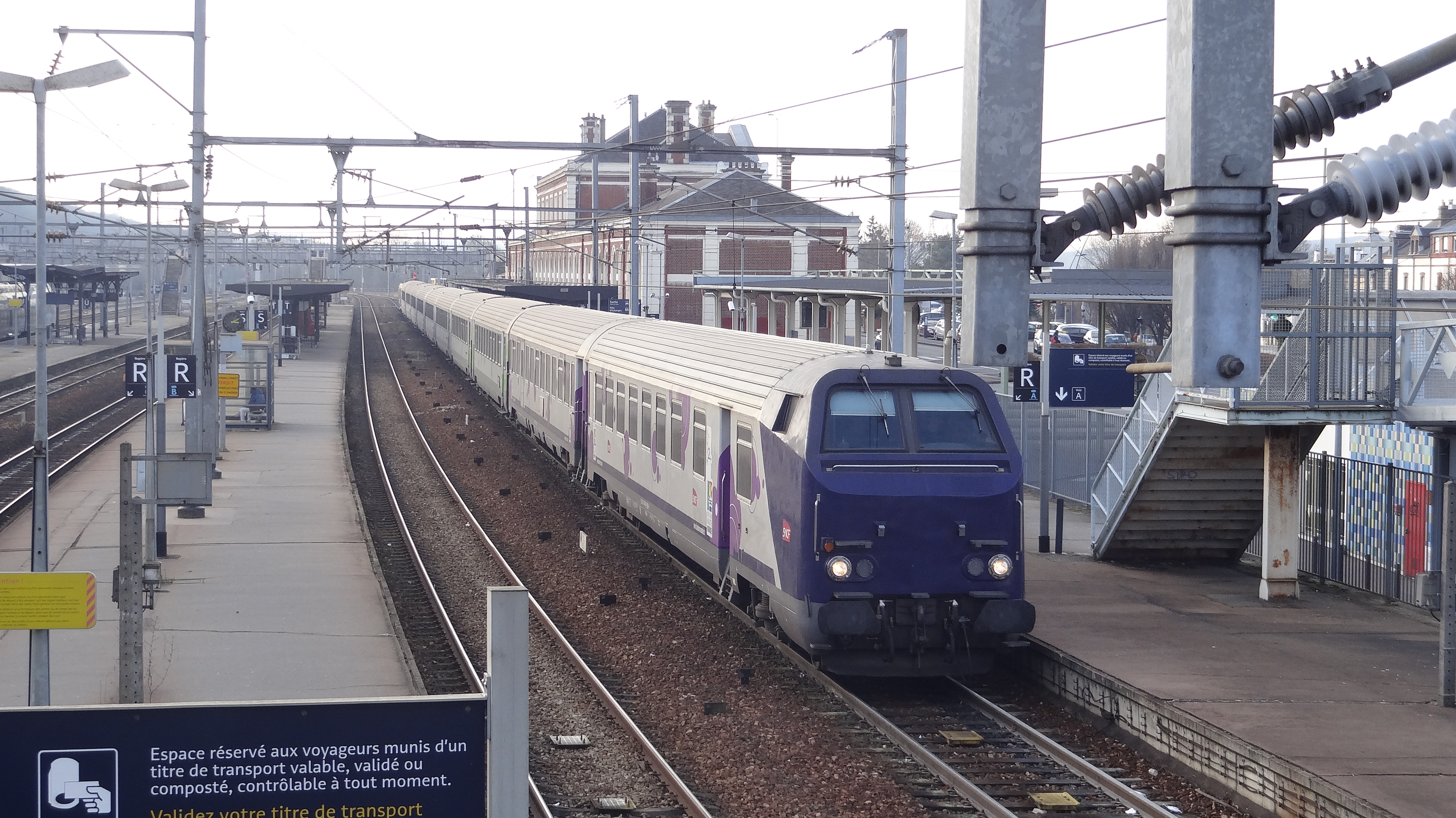 Gare d'Évreux-Normandie, Eure, France - Départ d'un train Intercités de la voie A, en direction de Paris.